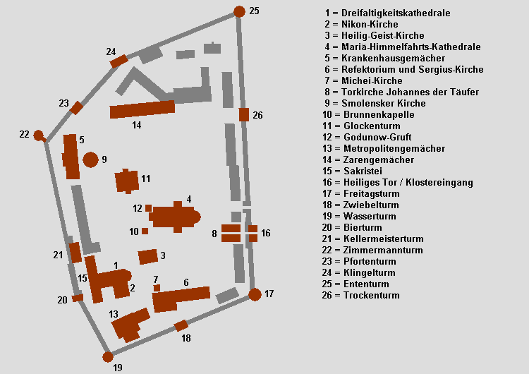 Grober Geländeplan des Dreifaltigkeitsklosters von Sergijew Possad, Russland